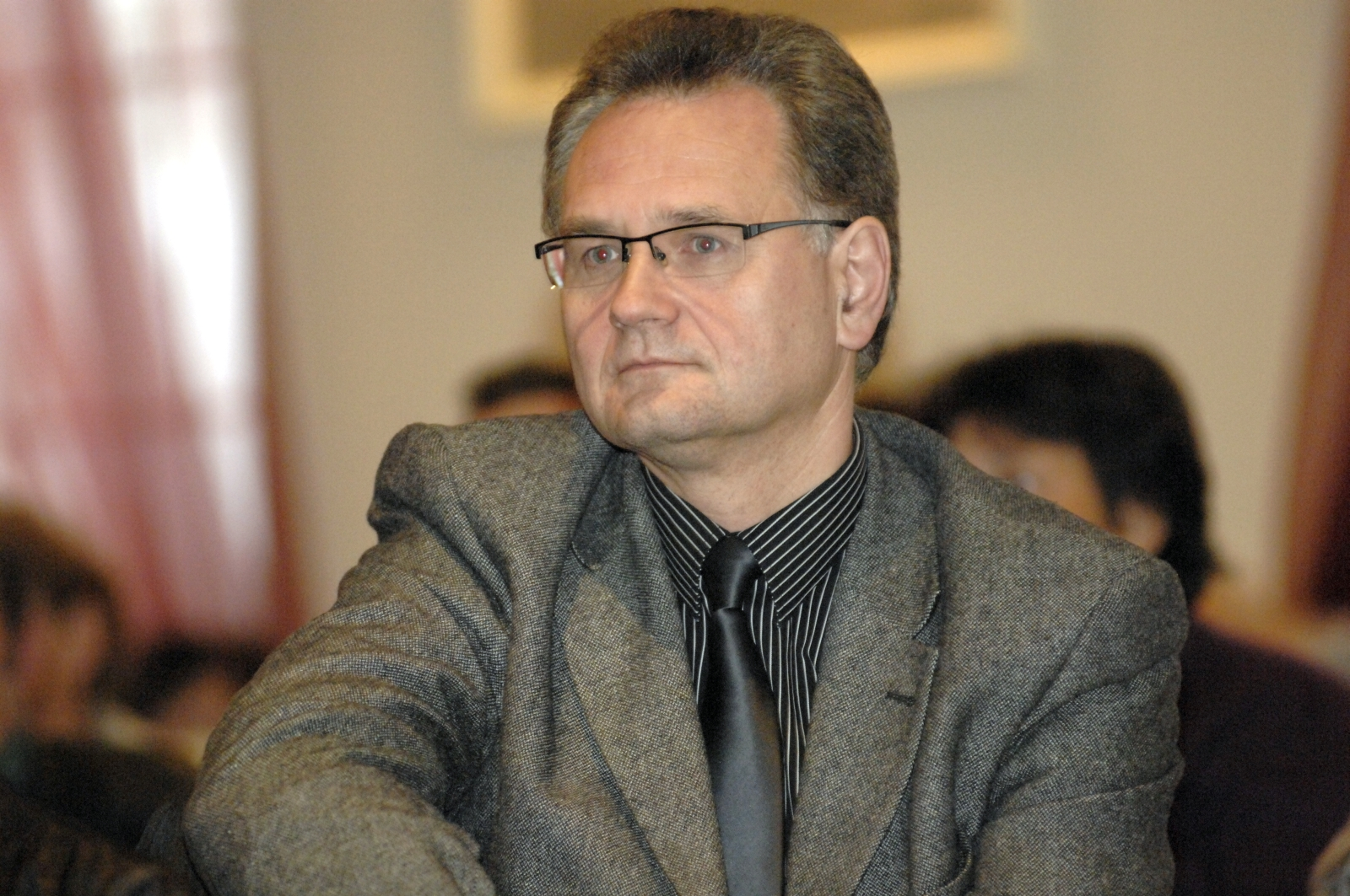 Andrzej Pruszkowski